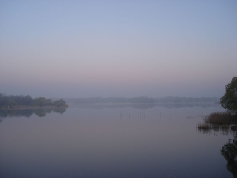 Der suedliche Wendsee am 12.04.2007, 6:30 Uhr MESZ, von der Seegartenbruecke nach Westen gesehen